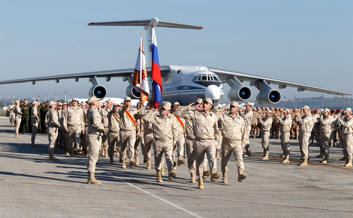 Во время посещения Президентом России Владимиром Путиным авиабазы Хмеймим в Сирии.